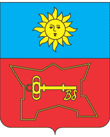 Герб Бару